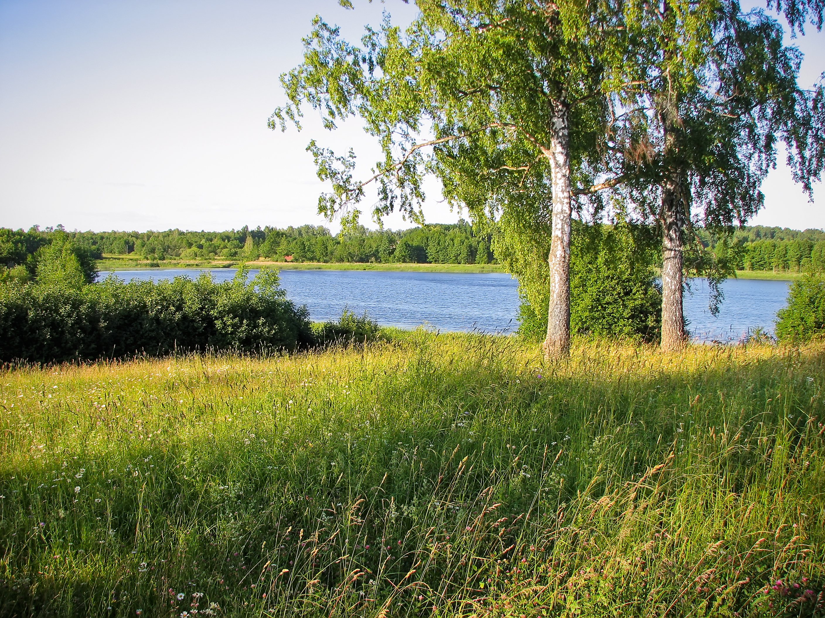 у озера